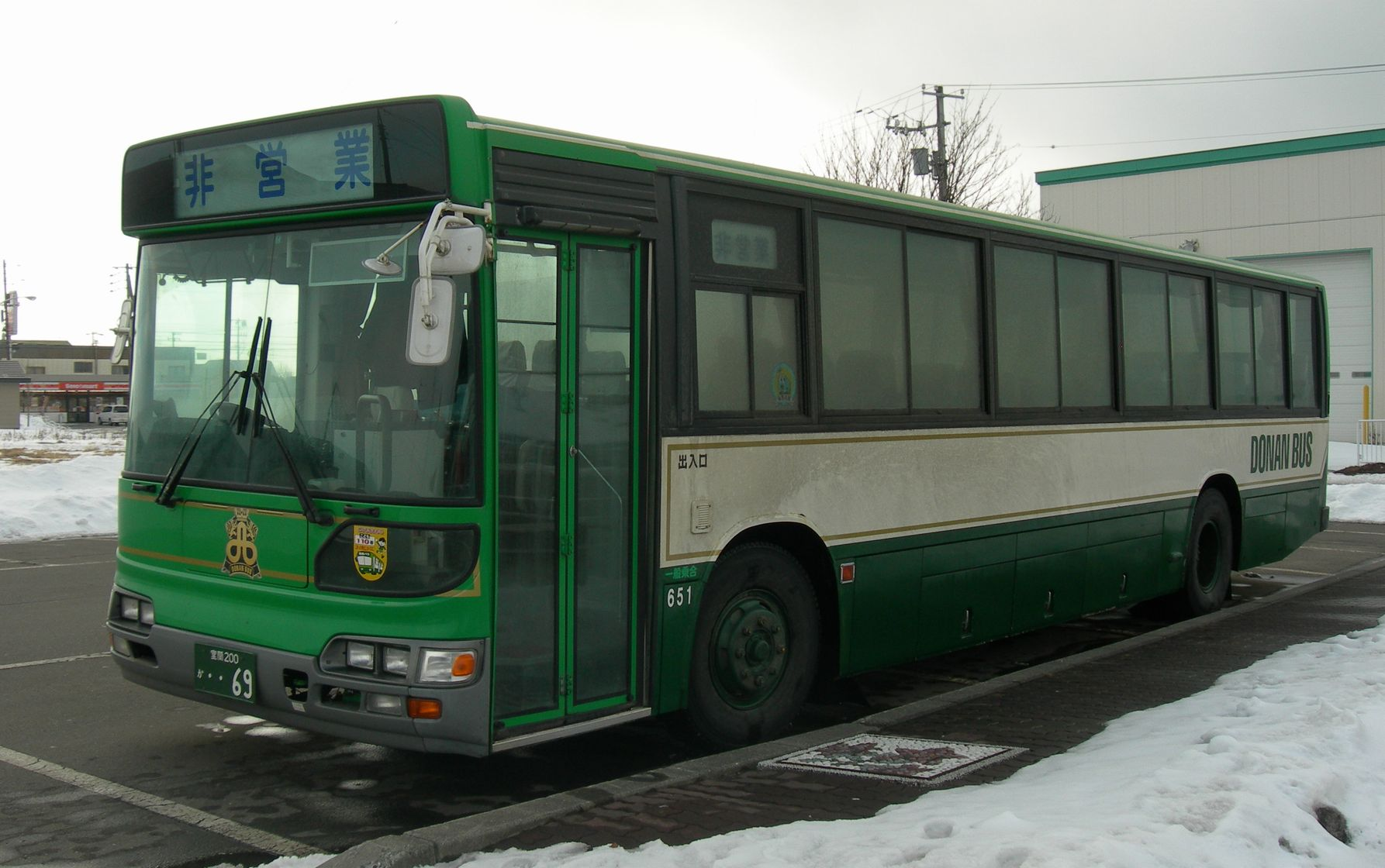 Dōnan Bus car 道南バス 路線バス